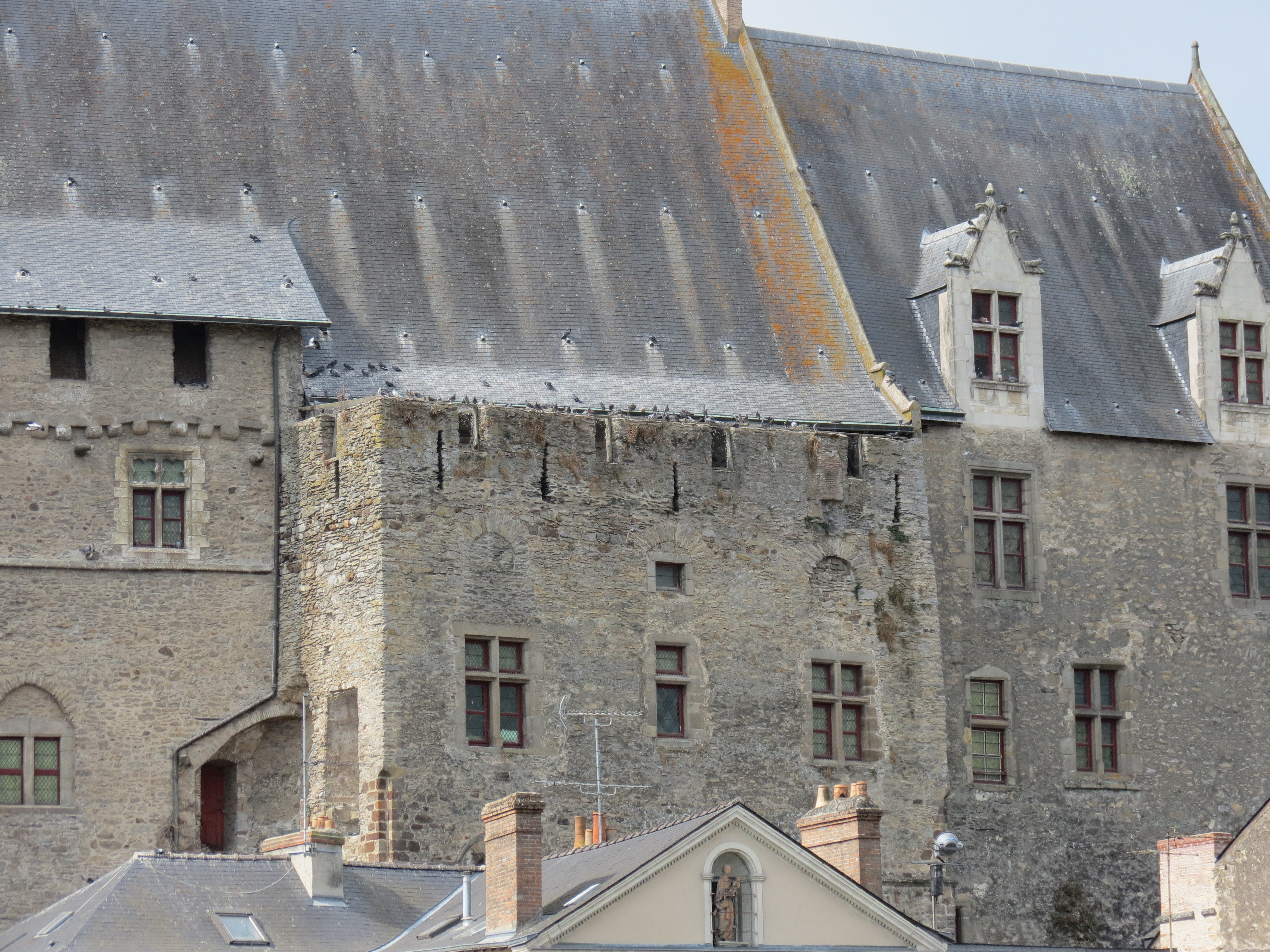 Château, Laval, Mayenne, Pays de la Loire.